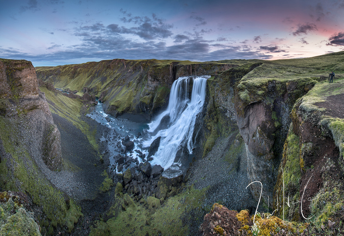 500px provided description: Cascada Fagrifoss camino a los carteres de Laki en el centro de Islandia [#sunset ,#water ,#summer ,#green ,#waterfall ,#polar ,#verde ,#atardecer ,#cascada ,#verano ,#musgo ,#Fagrifoss ,#Iceland ,#Laki ,#Islandia]